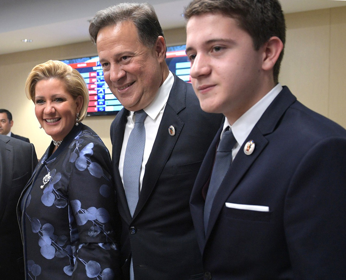 Президент Панамы Хуан Карлос Варела Родригес с женой и сыном в перерыве матча Чемпионата мира по футболу 2018 года